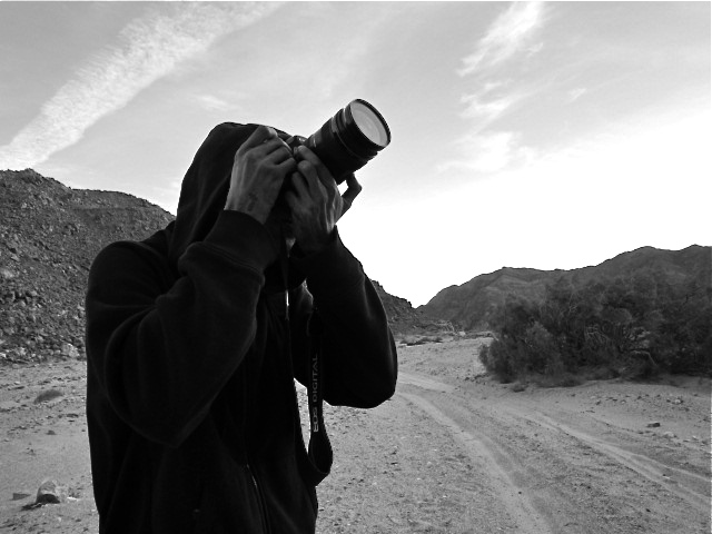 @3arabawy - Hossam